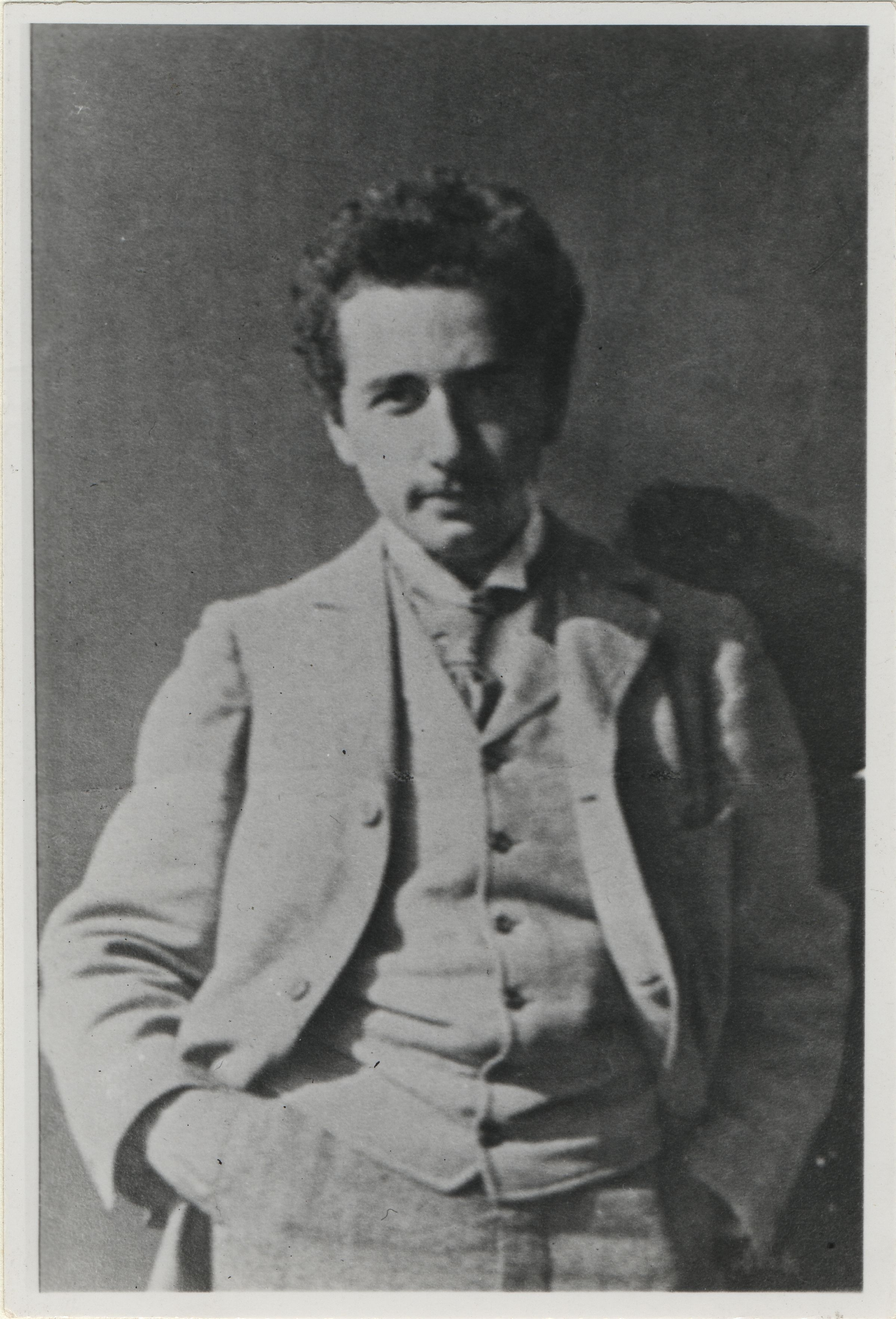 Физик Альберт Эйнштейн